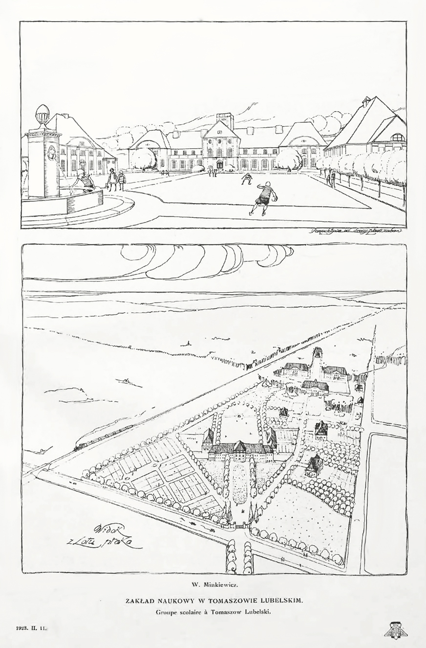 Projekt Zakładu Naukowego w Tomaszowie Lubelskim opracowany przez prof. Witolda Minkiewicza. Opublikowany w drugim numerze miesięcznika Architekt z 1923 roku. Pismo jest dostępne w domenie publicznej w bibliotece cyfrowej Politechniki Warszawskiej.